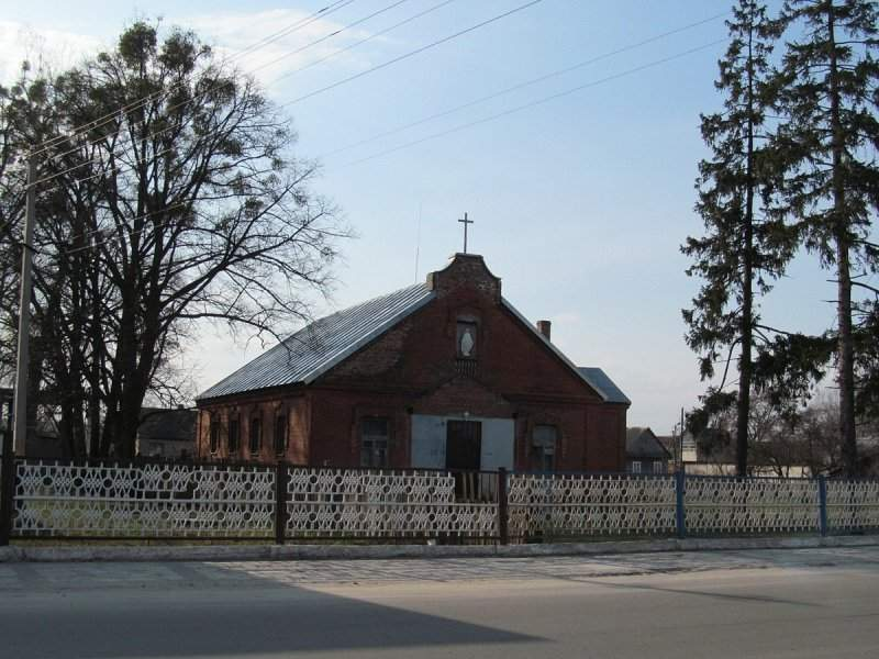 Мікашэвічы. Каталіцкая капліца